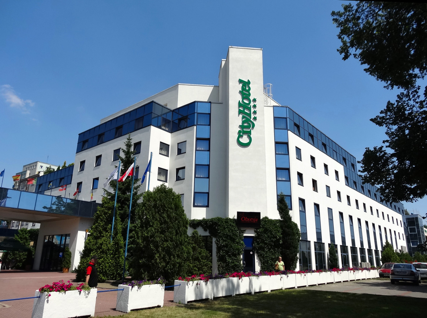 Hotel City w Bydgoszczy przy ul. 3 Maja